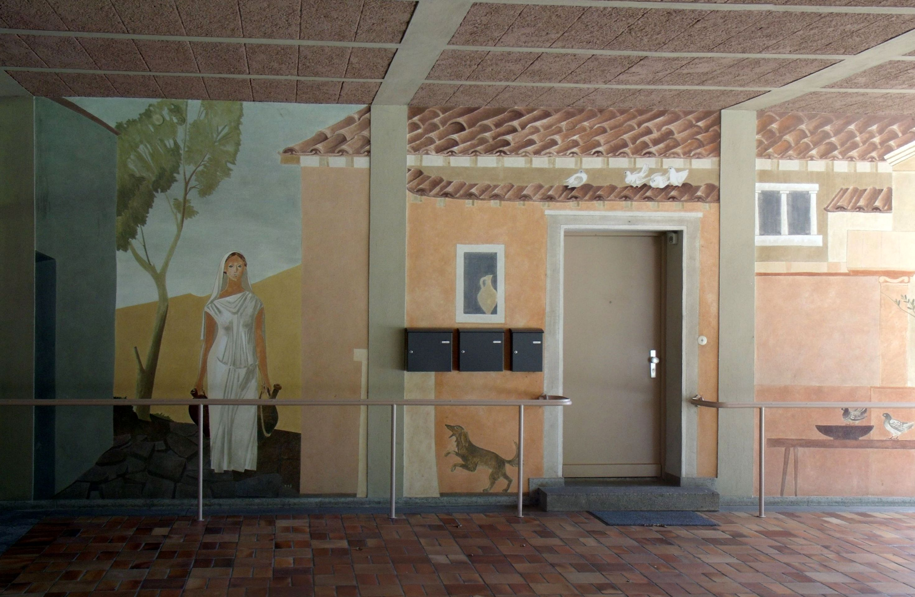 Öffentliche Eingangshalle der Schule